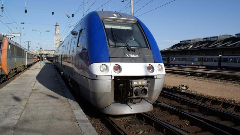 X76595-596 (Le Pays des Sources) arrivant du dépot à Amiens